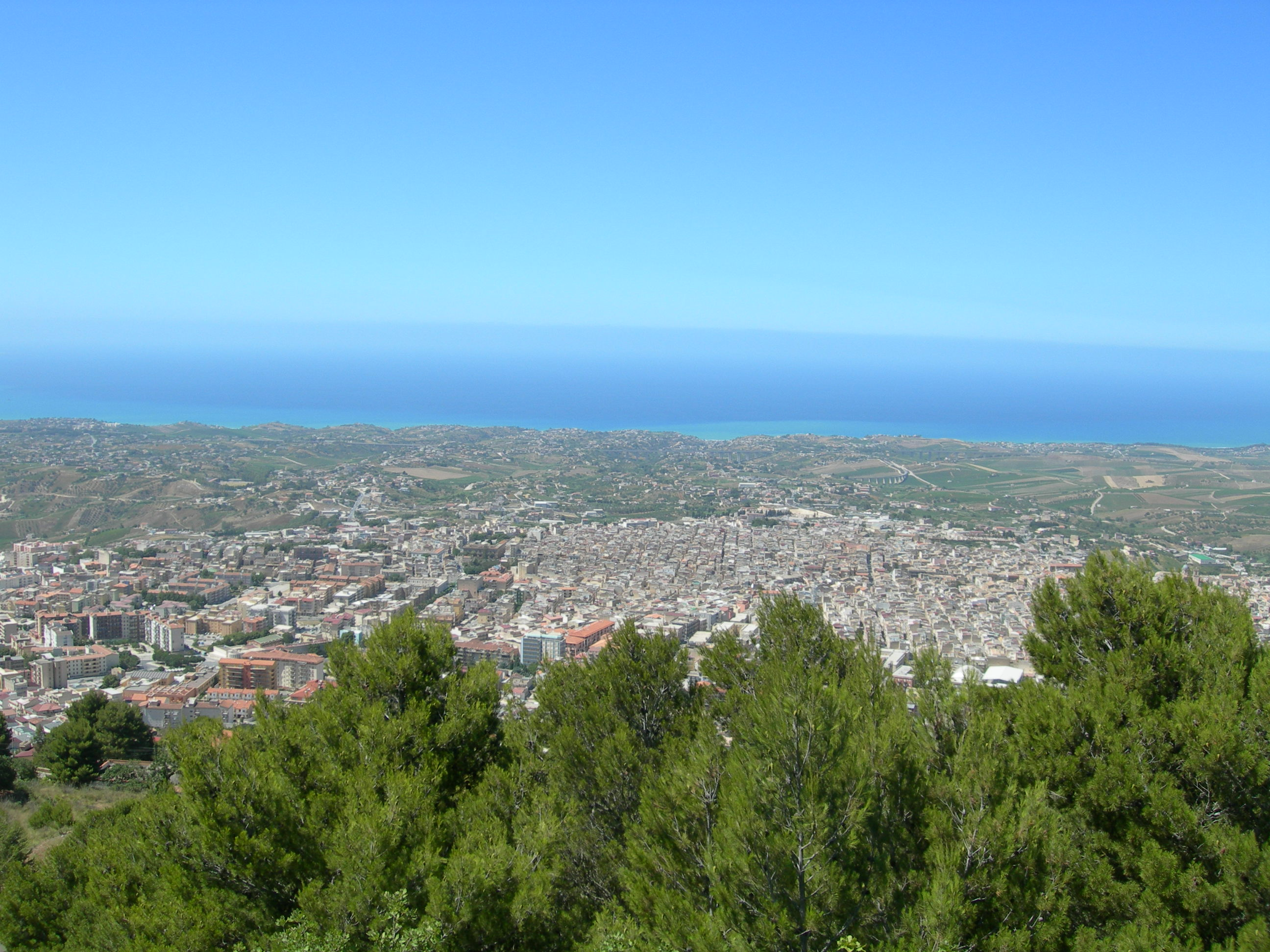 Alcamo